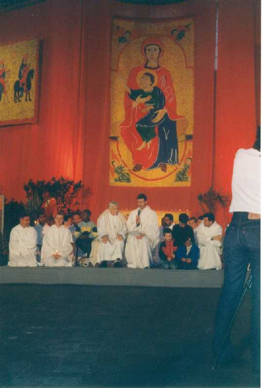 Imatge del Germà Roger a la Trobada Internacional de Barcelona de Taizé el Nadal de l'any 2001 (o bé 2000?)